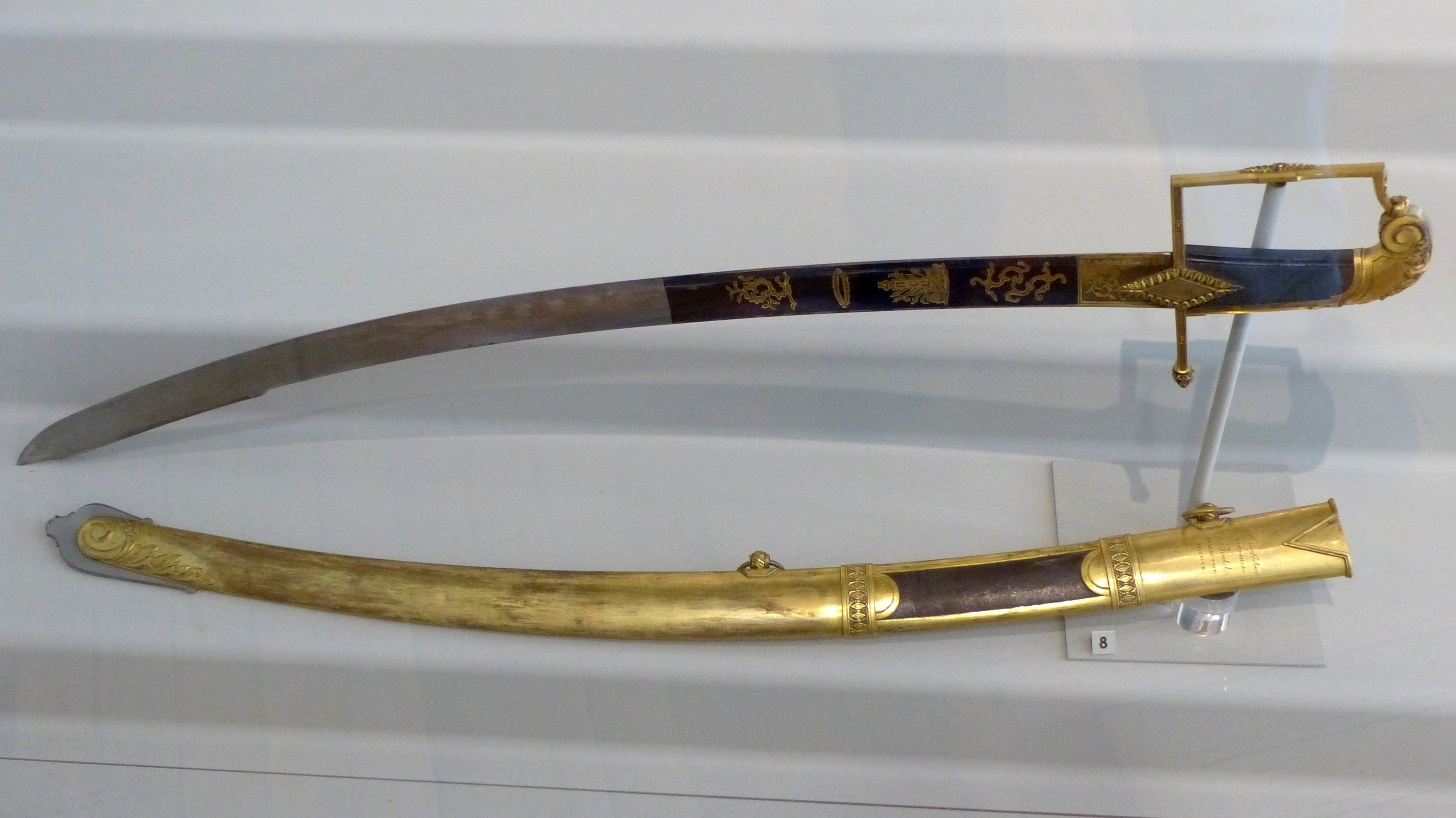 Nice (Alpes-Maritimes, France), sur la promenade des Anglais, la Villa (palais plutôt) Masséna, siège du musée du même nom. Sabre d'honneur offert par le Directoire au général Rusca; réalisé par Nicolas-Noël Boutet (1761-1833), manufacture d'armes de Versailles; acier et laiton doré, fin XVIIIe siècle.